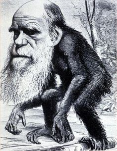 დარვინი